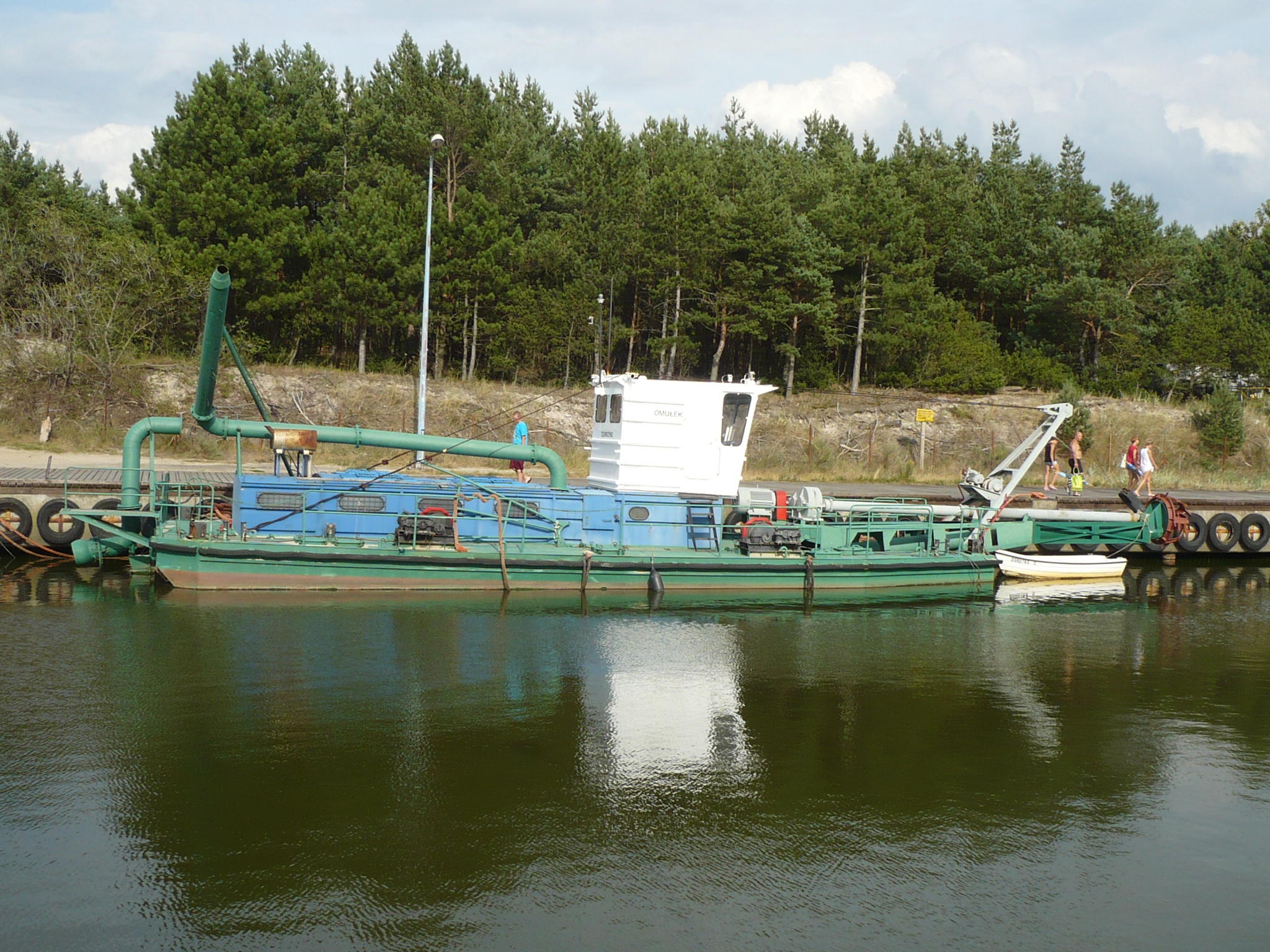 Statek w porcie